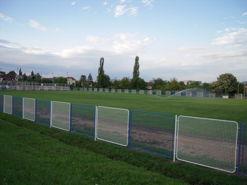 Stadion Fk BSK-a